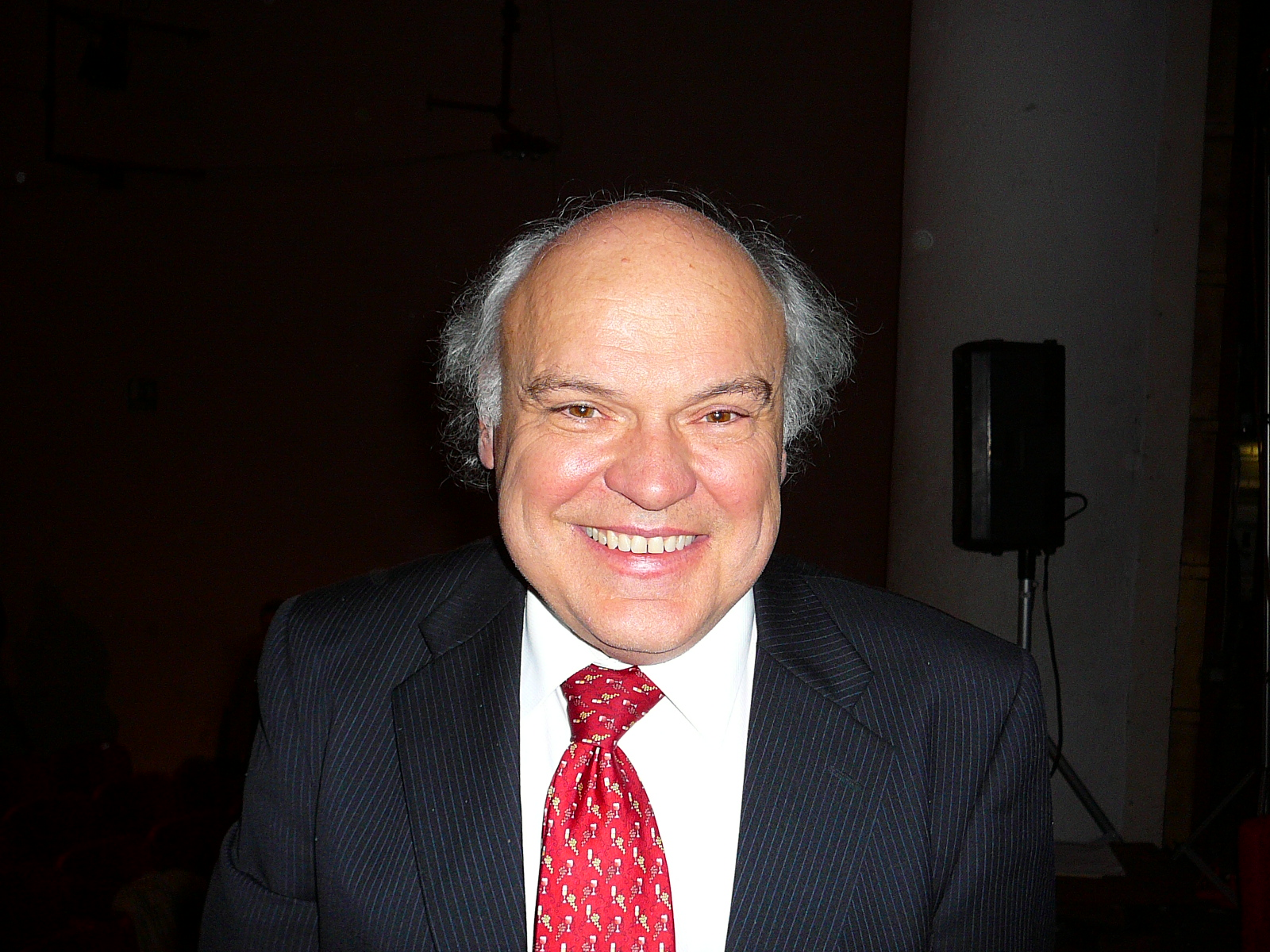 Donal O'Shea in occasione del Premio Peano 2007